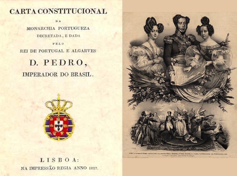 A carta constitucional e a família real, dona Amélia e o senhor dom Pedro IV, duques de Bragança com a senhora dona Maria II, rainha de Portugal.